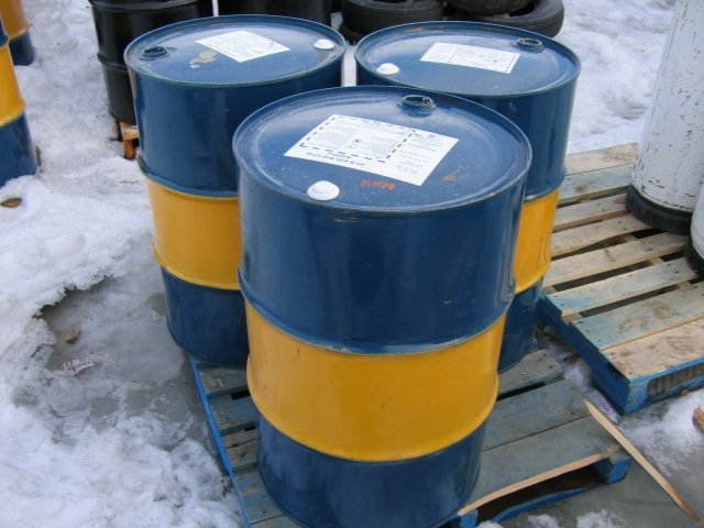 petroli car